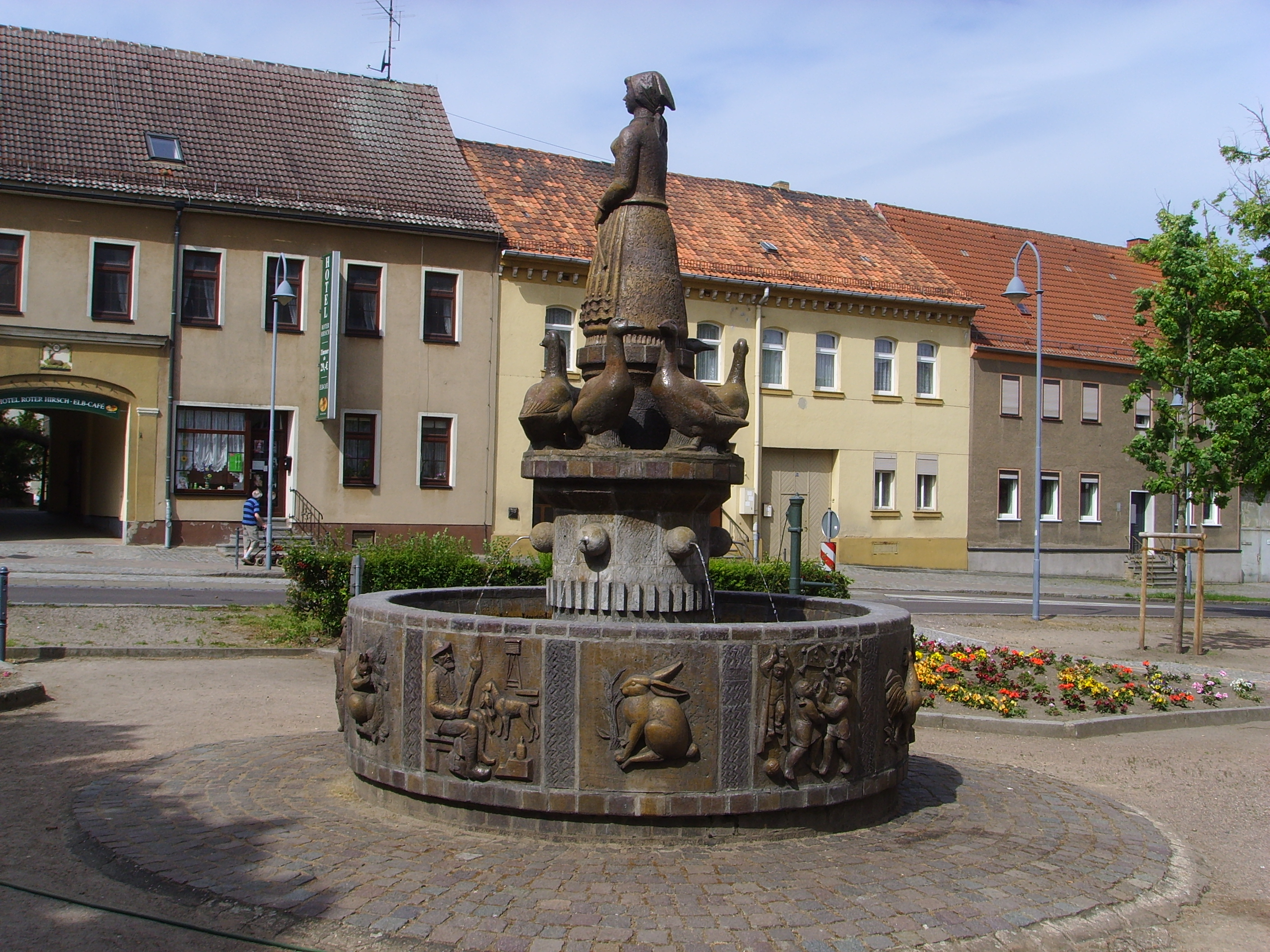 Gänsebrunnen (1983 vom Bildhauer Bruno Kubas) in Dommitzsch in Sachsen, Deutschland